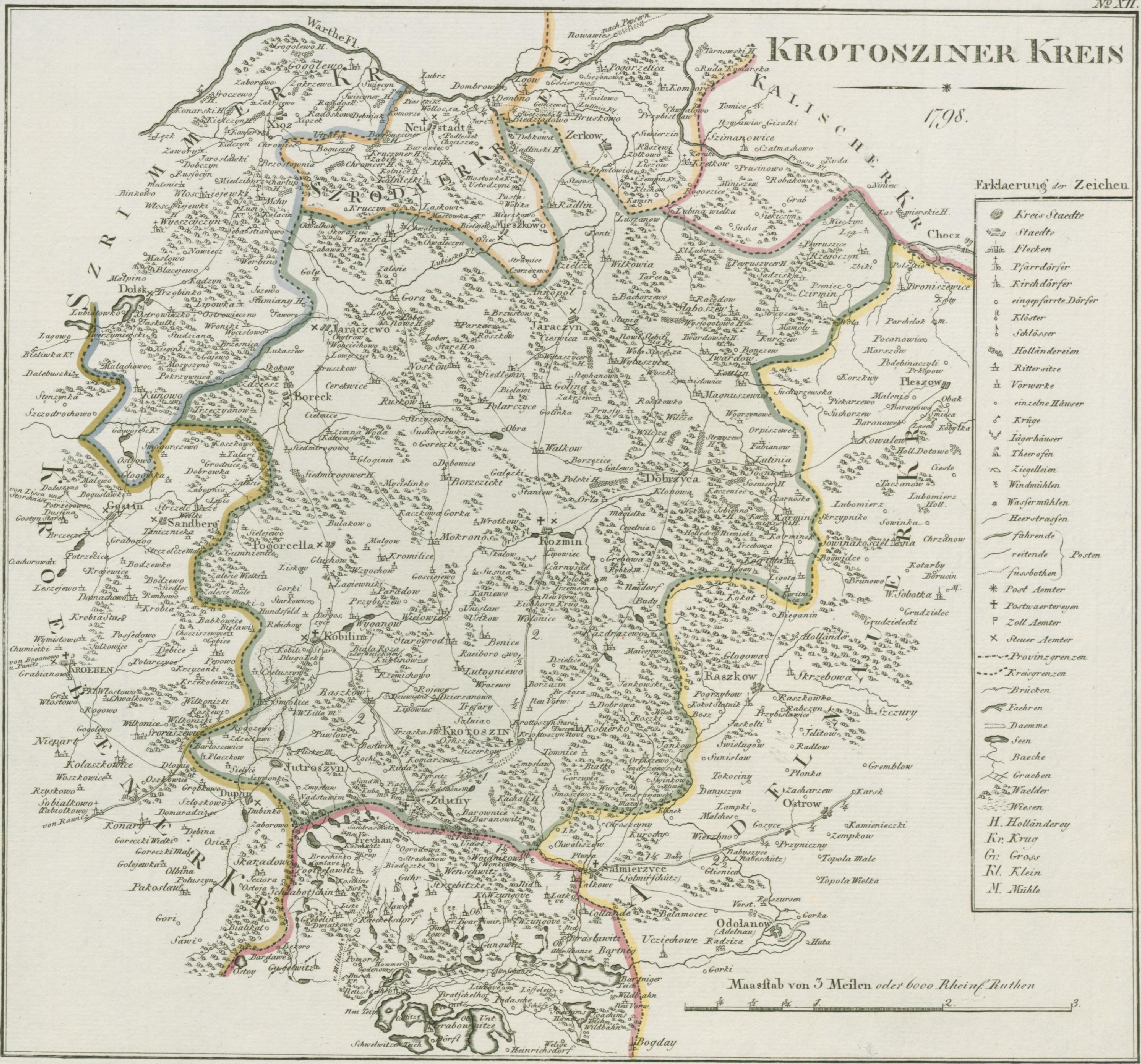 Map of "Kreis Krotoschin" as of 1798